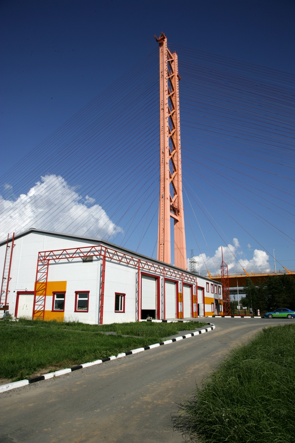 Большинство ДРП ГП "Северавтодор" имеют единый архитектурный стиль и построены собственными силами предприятия